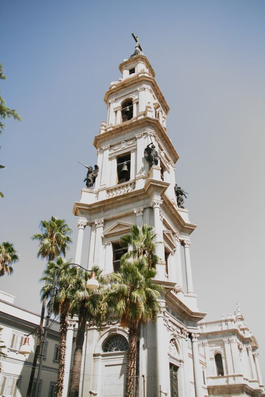 Pompei, Campania, Italia